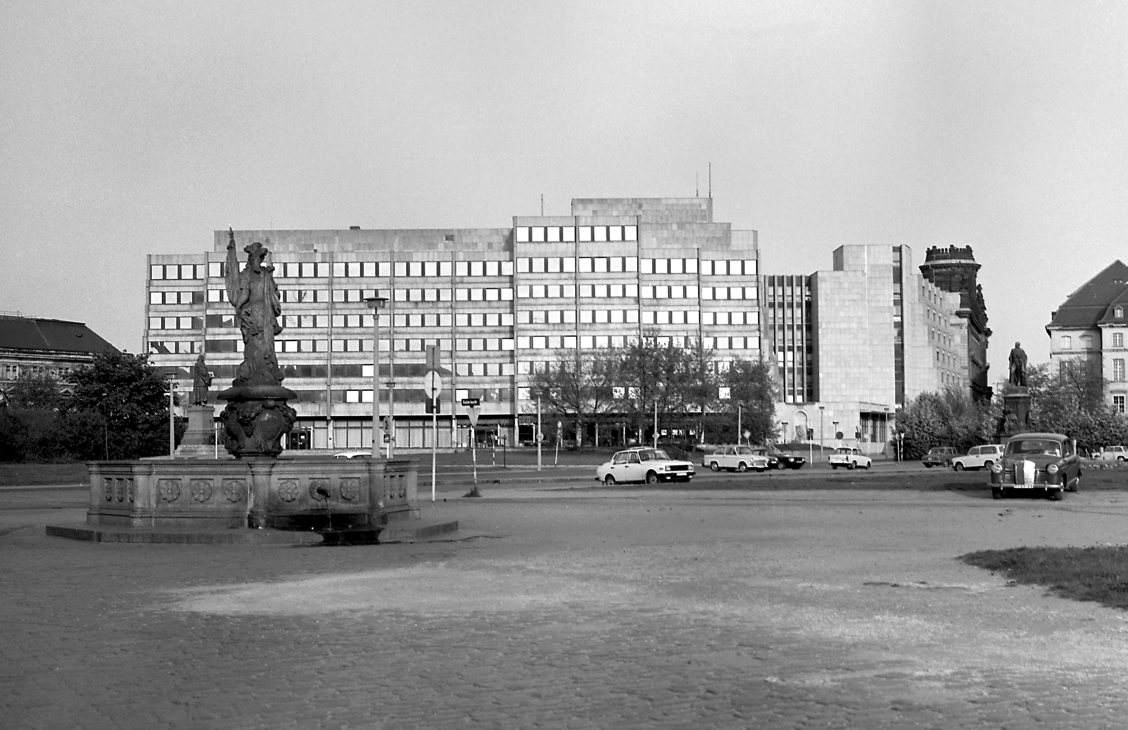 05.05.1986 Dresden-Altstadt, Neumarktareal: Neues Polizeipräsidium. Der Erweiterungsbau des ehemaligen "Volkspolizei-Kreisamtes" wurde von 1976 bis 1979 von Günter Fischer, Manfred Fasold und Kollektiv errichtet und 2005 wieder abgebrochen. Vorn der Friedensbrunnen (seit 1683 auch Türkenbrunnen), Brunnentrog 1648, bekrönende Figur der Friedensgöttin Irene 1683 von C. M. Süssner. Der Brunnen steht hier nach dem II. WK wieder an seinem ursprünglichen Standort, an dem er bis 1866 gestanden hatte. Im Zuge des Wiederaufbaus des Neumarktareals wird er später erneut, wie schon 1866, vor das Johanneum versetzt werden. [R19860505A0004.TIF]19860505400NR.JPG(c)Blobelt